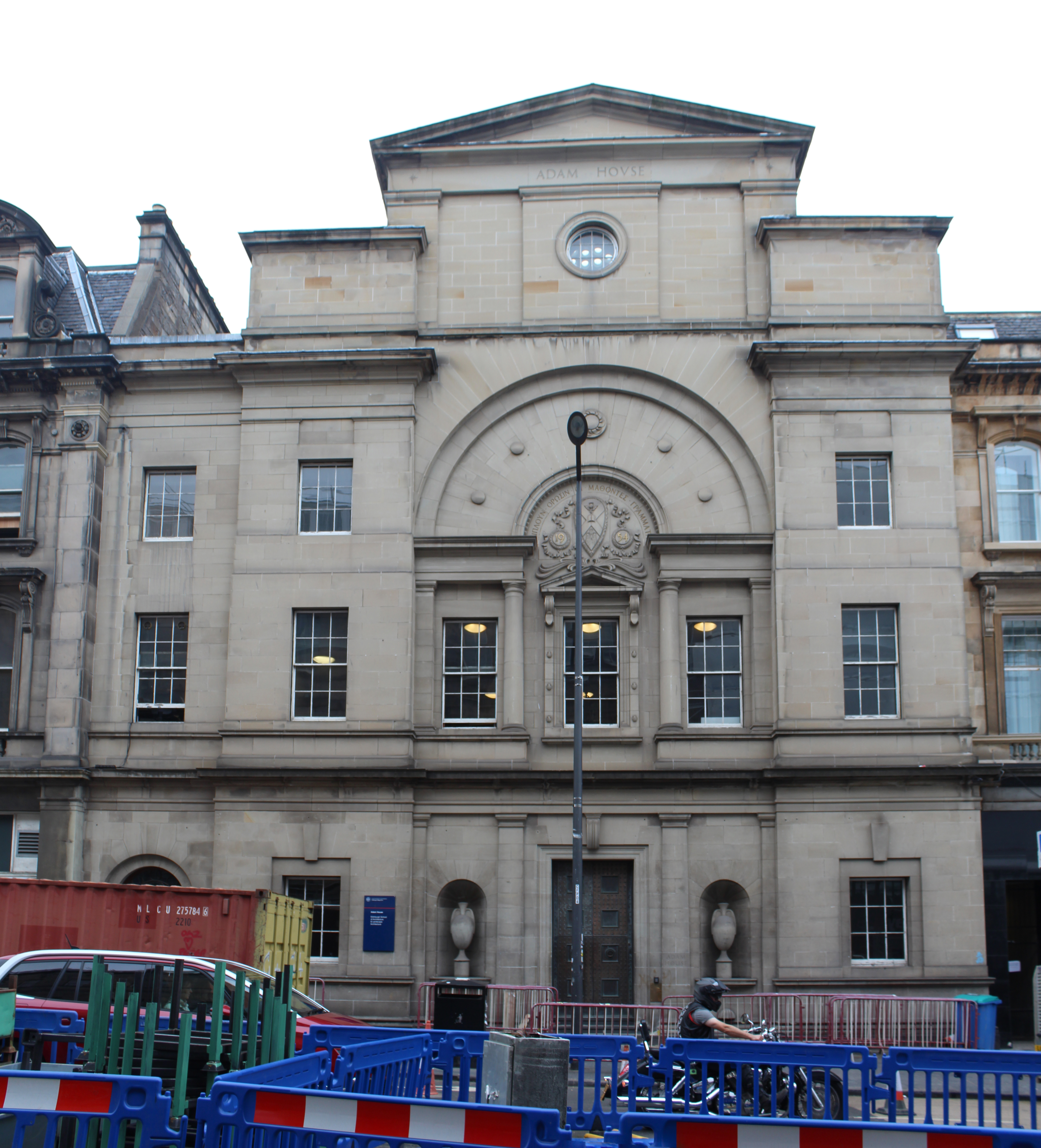 Maison Adam, Édimbourg.